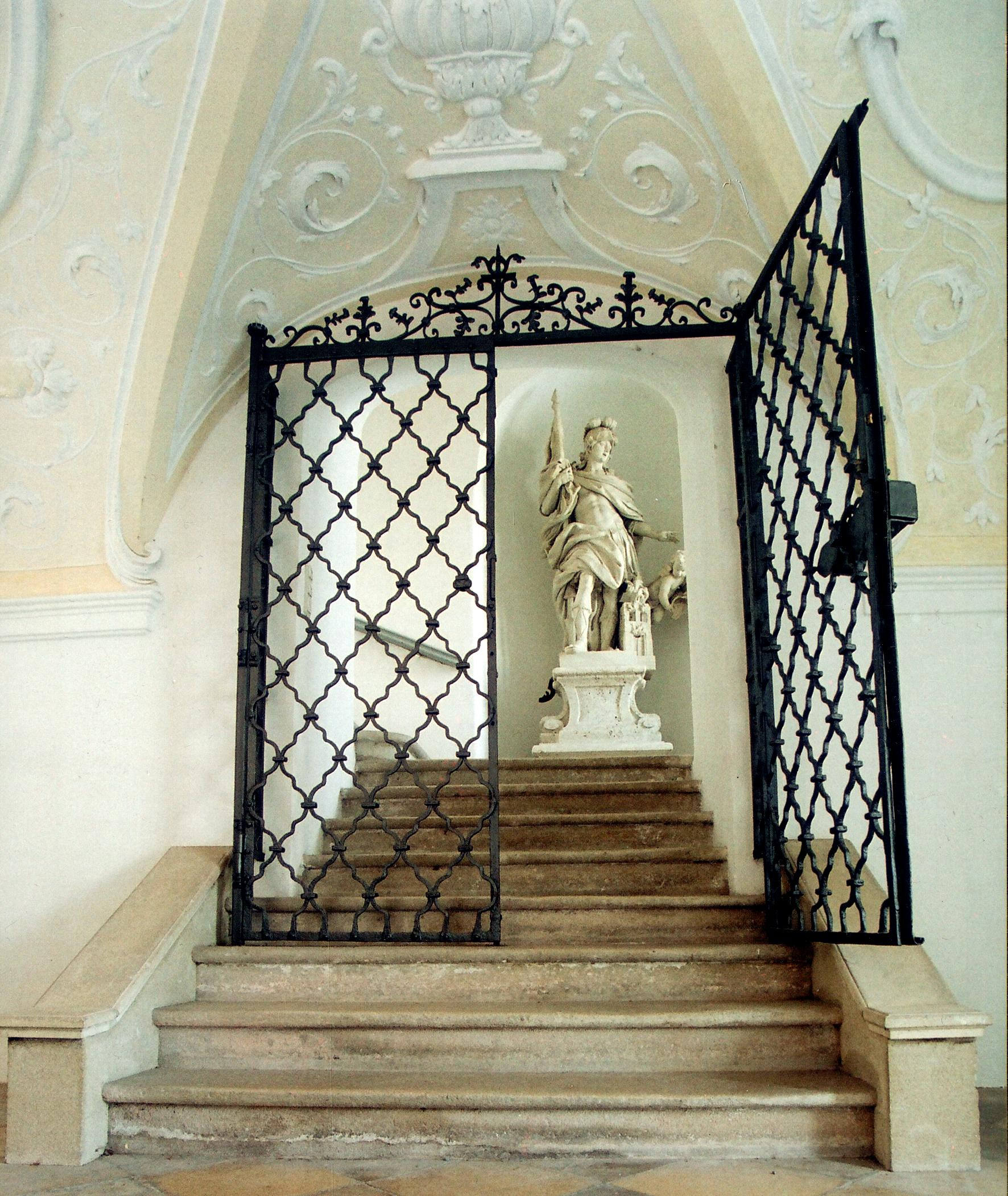 Kaiserstiege